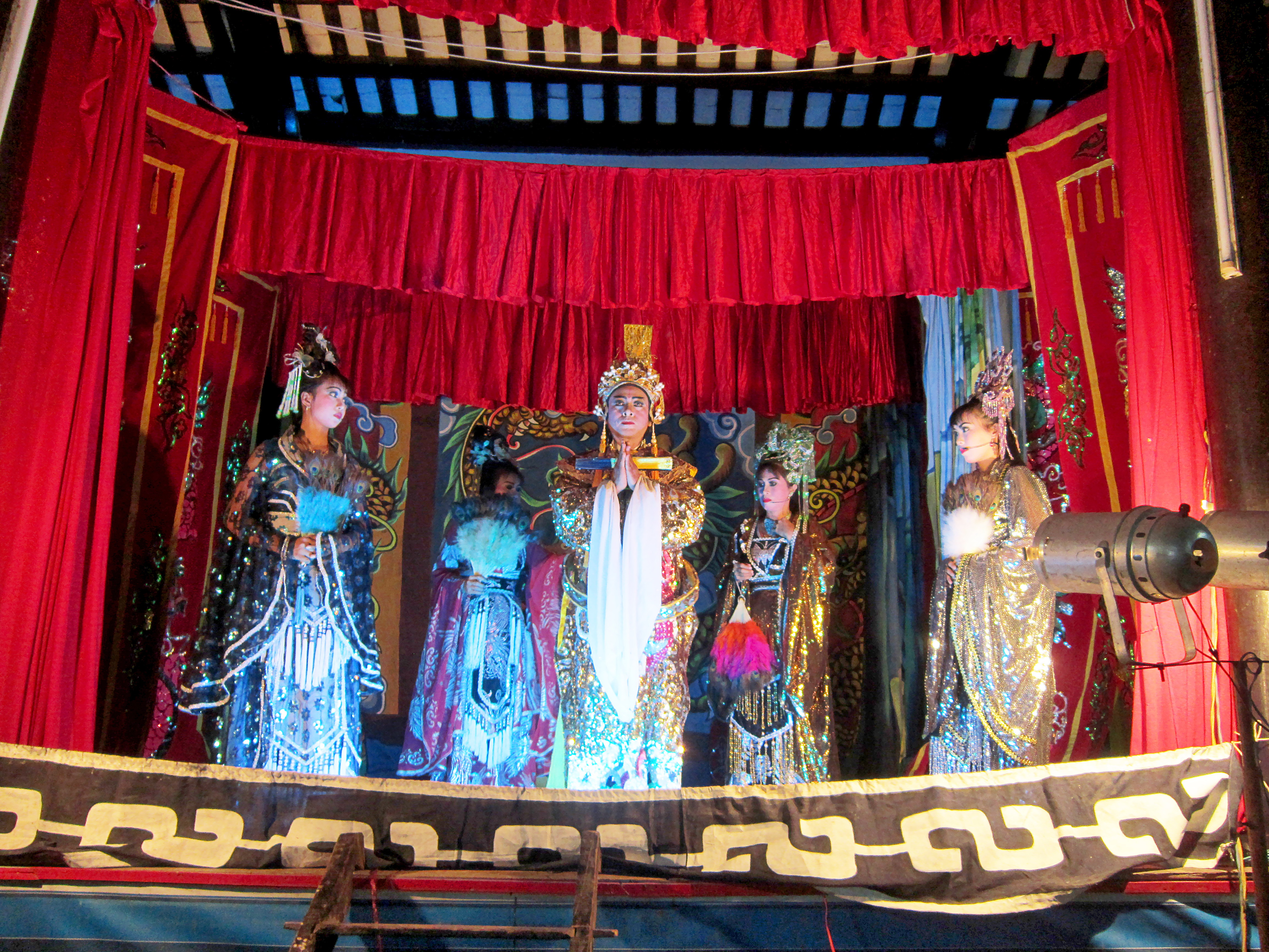 Một tiết mục hát cúng trong lễ Khai tràng Đại bội trong lễ Kỳ yên tại đình Mỹ Phước (Long Xuyên, An Giang, Việt Nam) lúc 4-5 giờ sáng ngày 8 tháng 6 năm 2014.